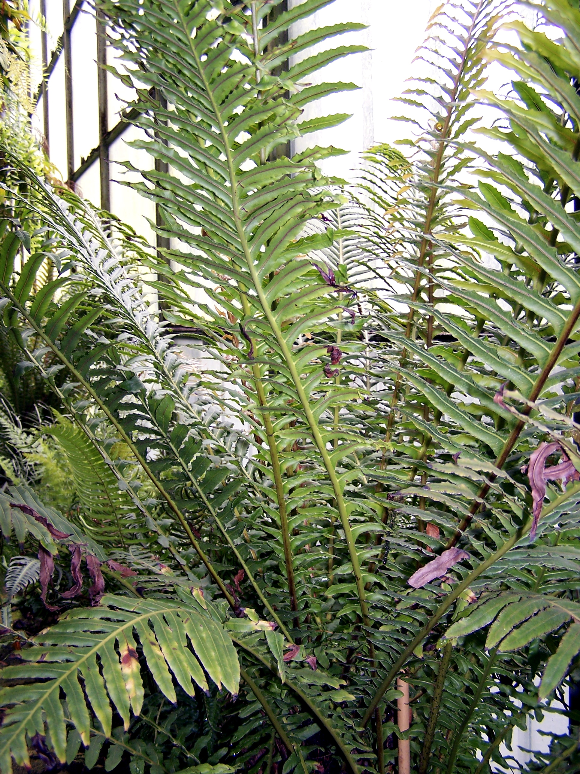 Blechnum brasiliense, Vieux jardin botanique de Göttingen 2006-06-17